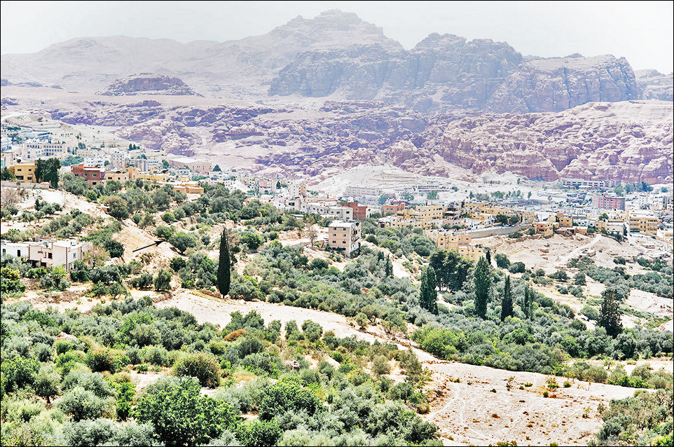 Village près de Pétra, Wadi Musa. Voir au milieu à gauche les anciennes terrasses.